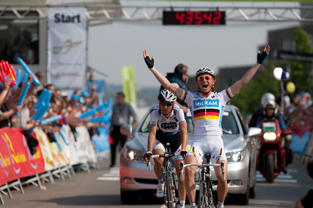 Fabian Wegmann (1) & Karsten Kroon (2). Eschborn-Frankfurt City Loop 2009 (Rund um den Henninger-Turm)